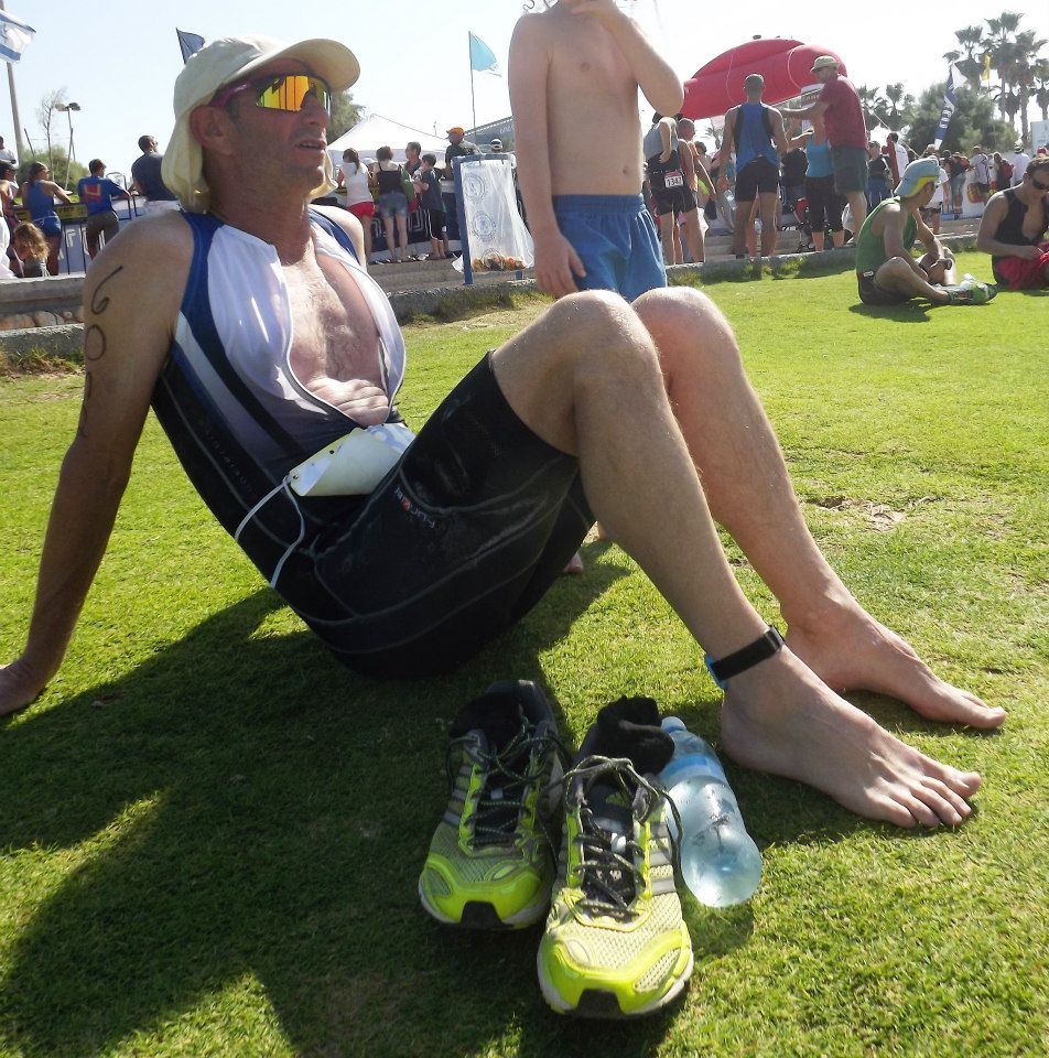 מיכה כגן בתצלום מ 2013